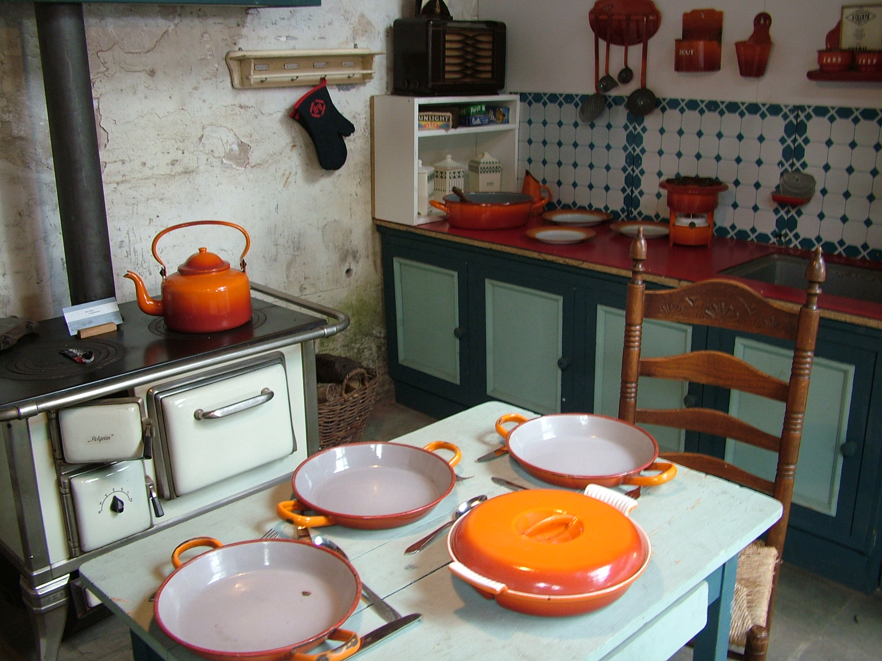 Tentoonstelling DRU, keuken met email.